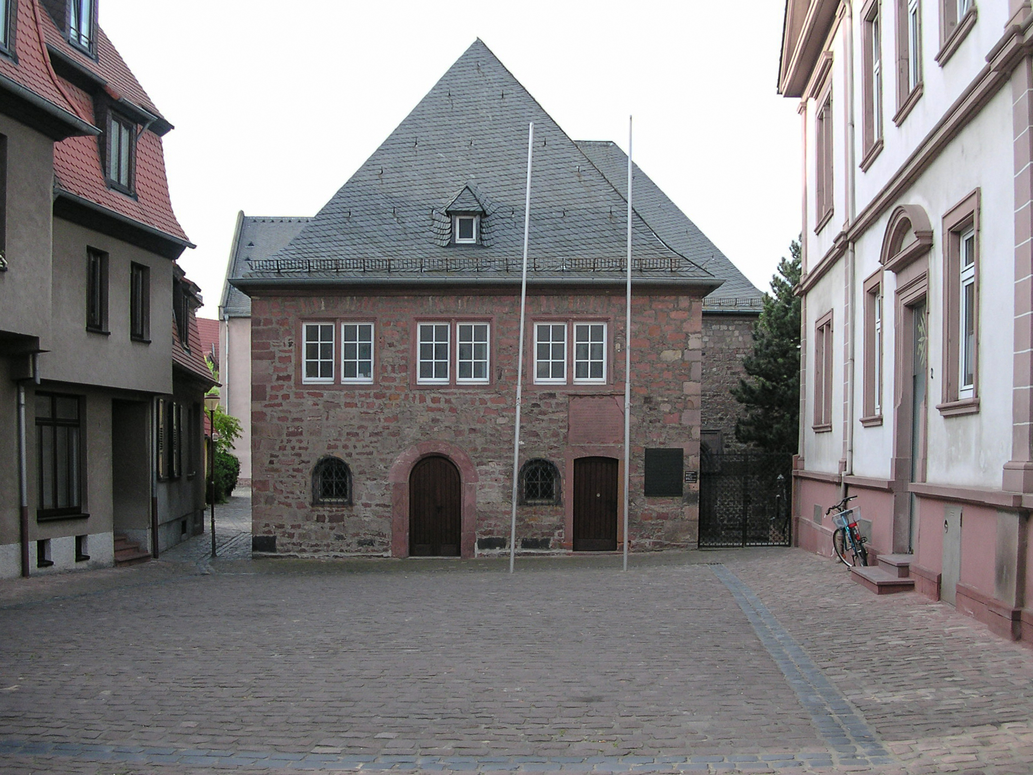 Synagoge in Worms